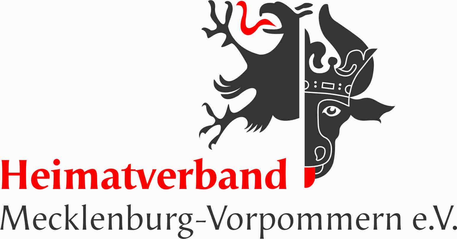 Logo des Heimatverbandes Mecklenburg-Vorpommern